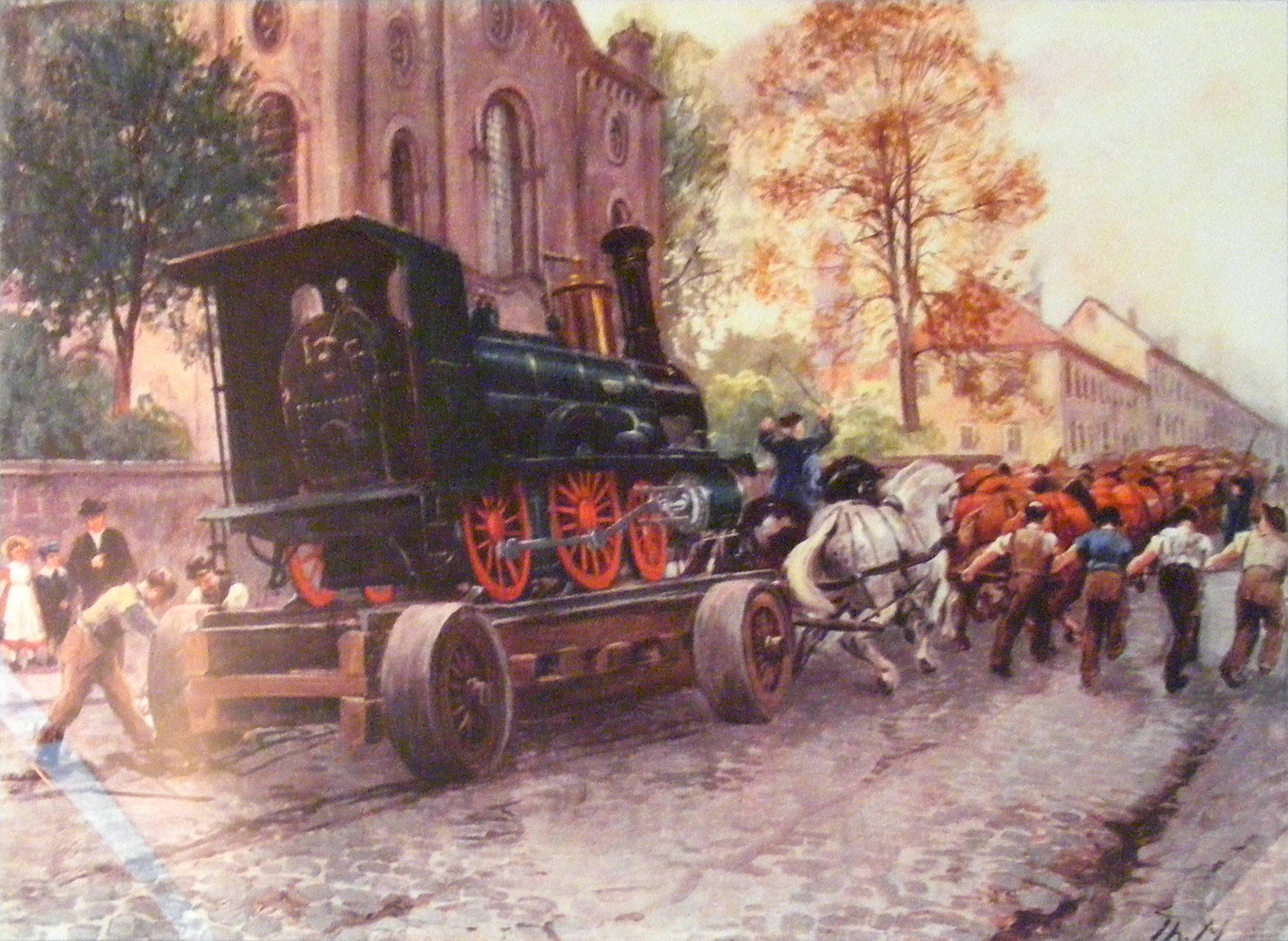 DB Museum Nürnberg – Lokomotivtransport der Henschelwerke durch Kassel, gemalt um 1865 (Maler nicht genannt).